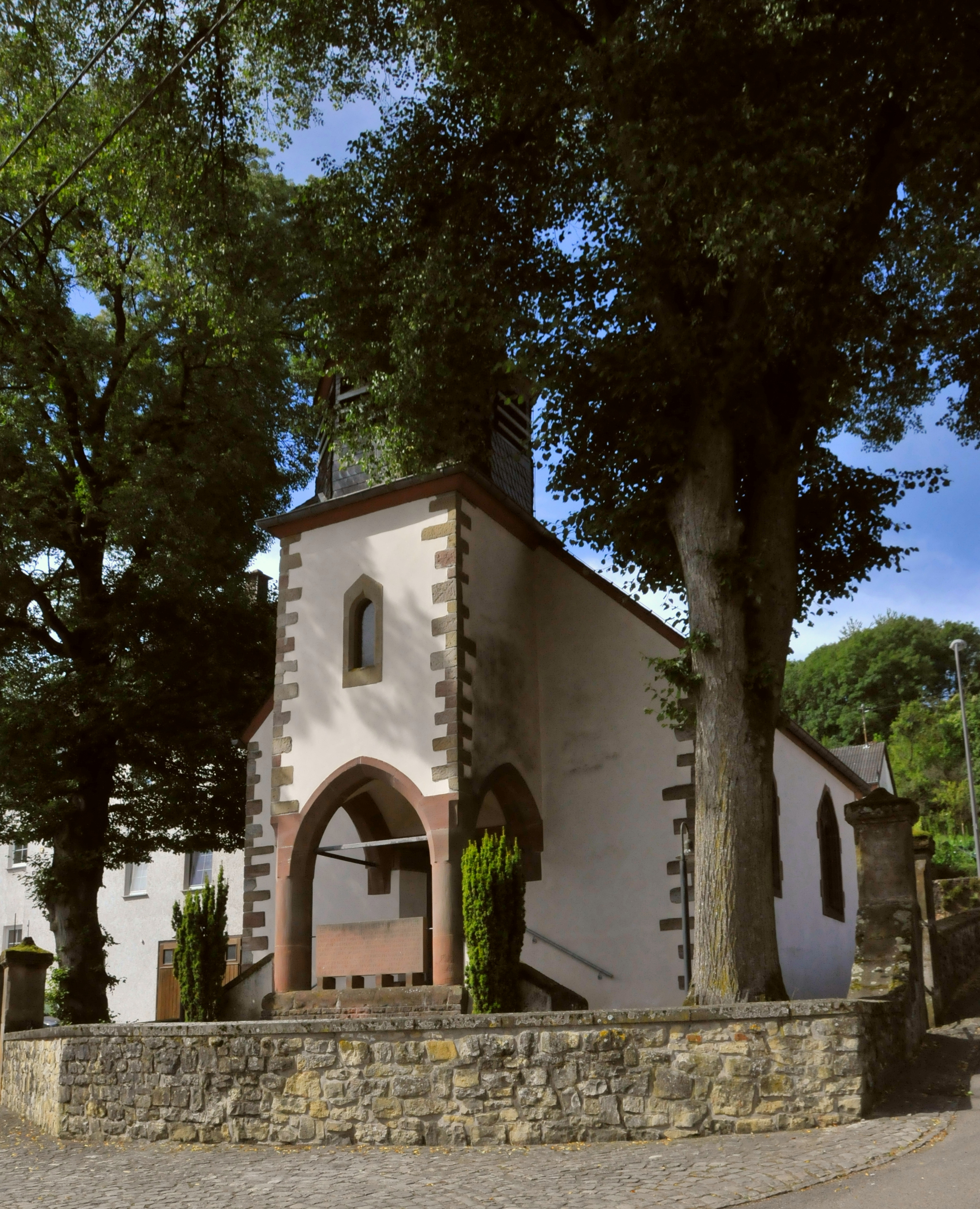 Kelsen, Kirche